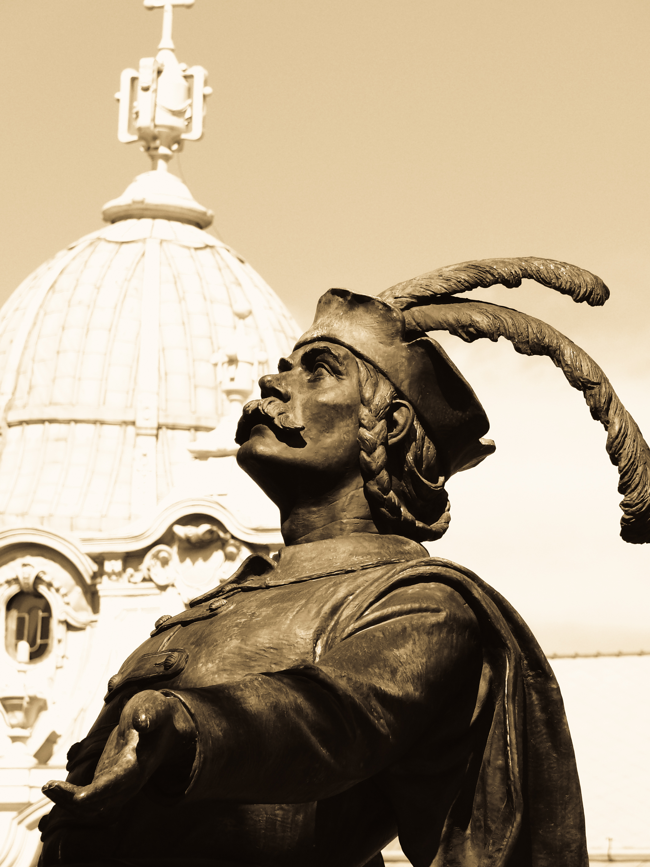 Statuia ecvestră a lui Matei Corvin